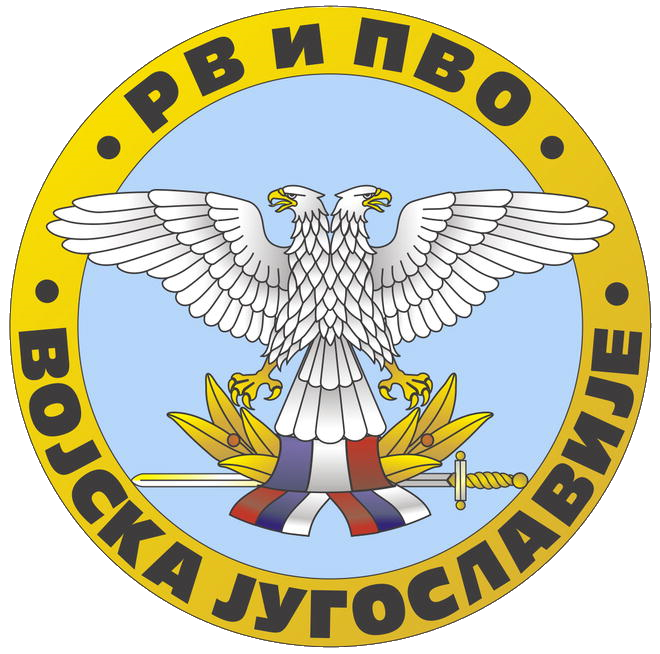 Герб ВВС и ПВО Союзной Республики Югославии